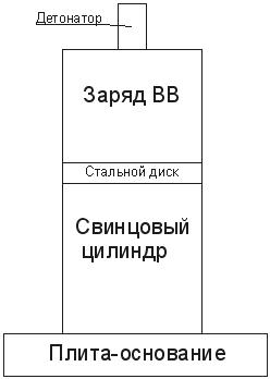 Схема пробы Гесса Схема испытания при определении бризантности взрывчатых веществ.